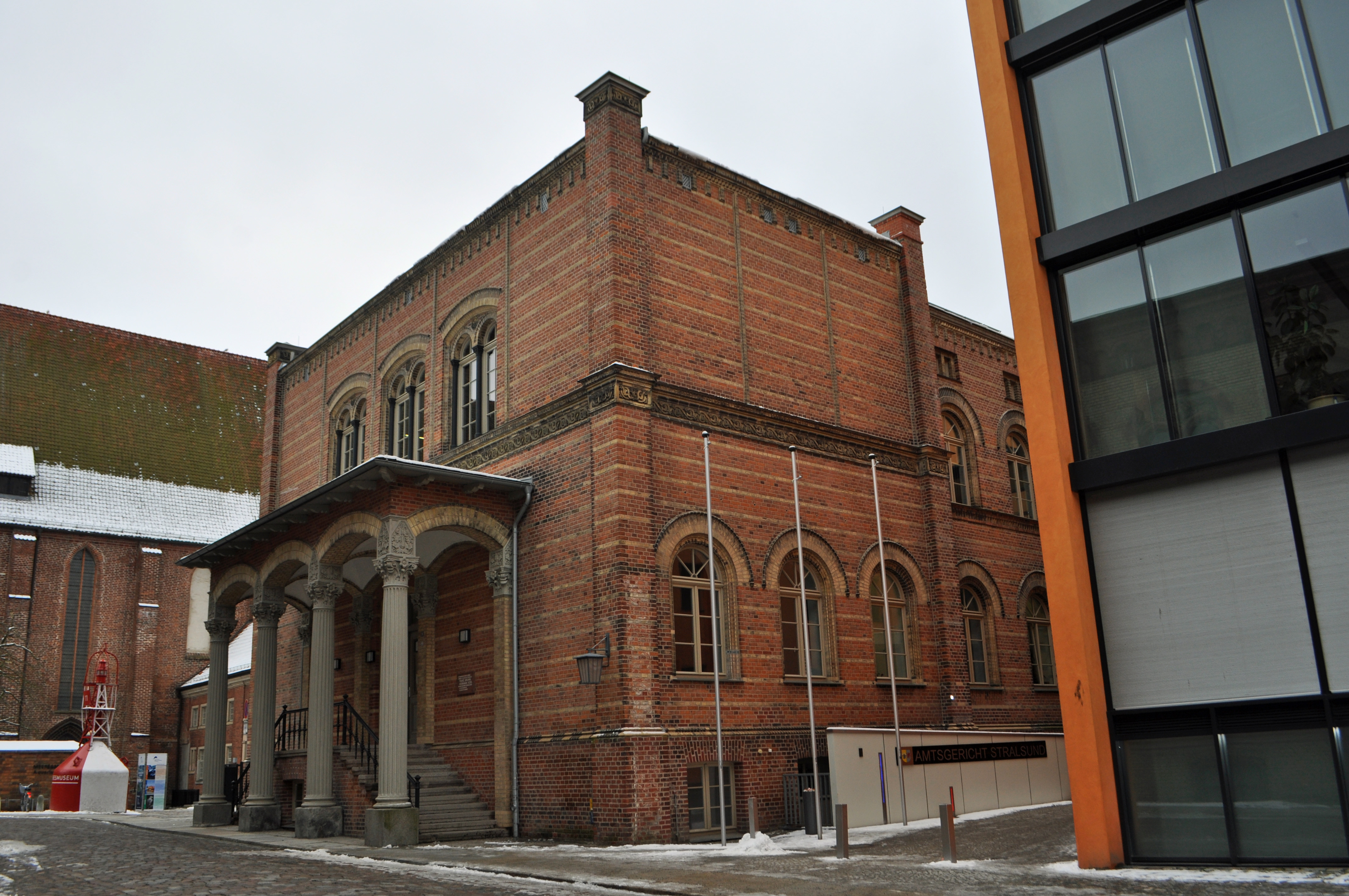 Stralsund, Bielkenhagen 9, (2013-02-13), by Klugschnacker in Wikipedia This is a photograph of an architectural monument.